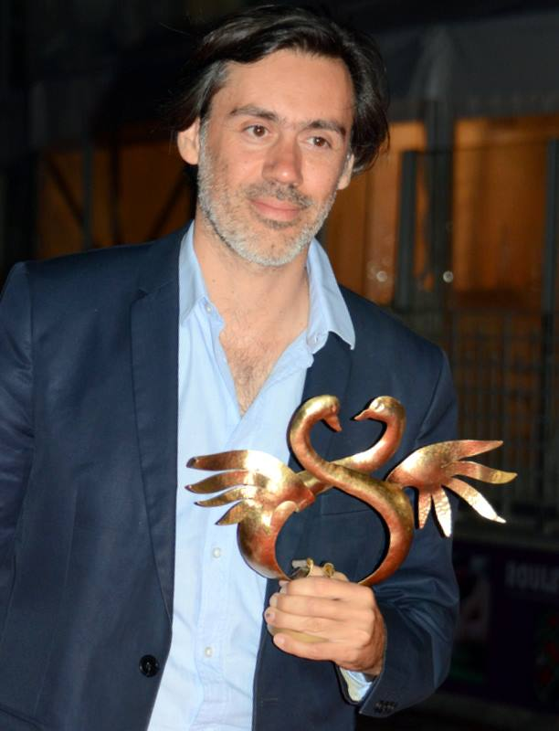 Emmanuel Mouret au festival du film de Cabourg